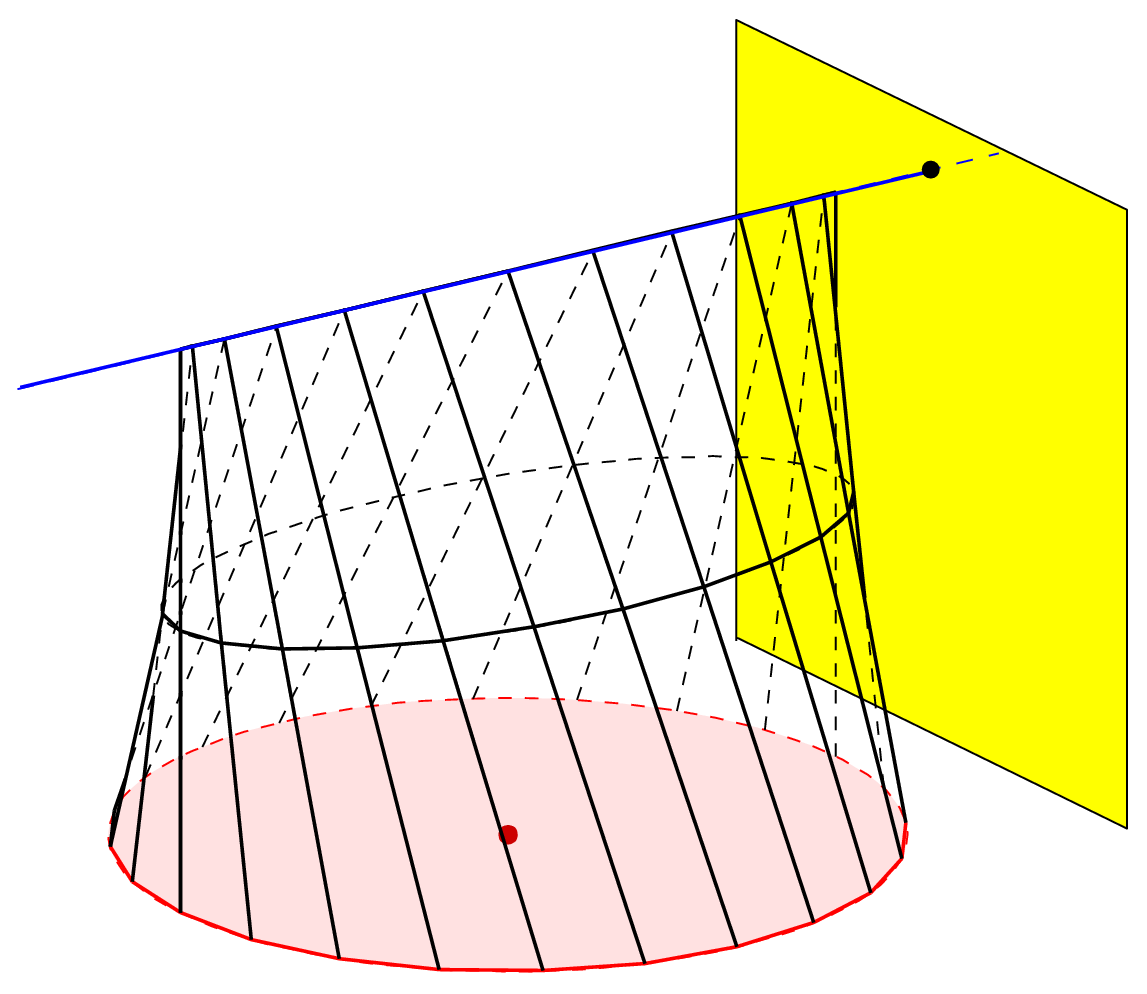 gerades Kreis-Konoid